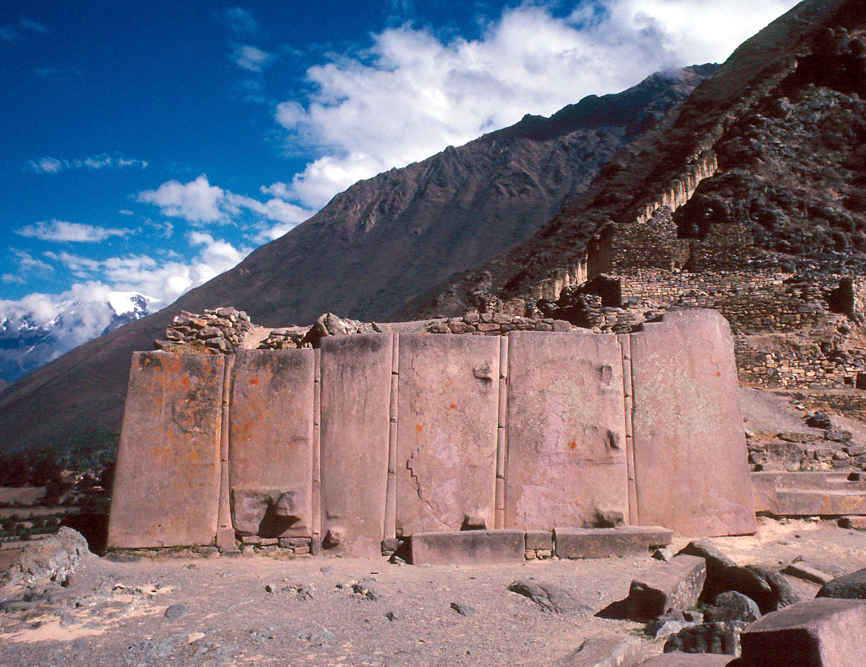 Über 3 m hohe Monolithen in Ollantaytambo (Peru).